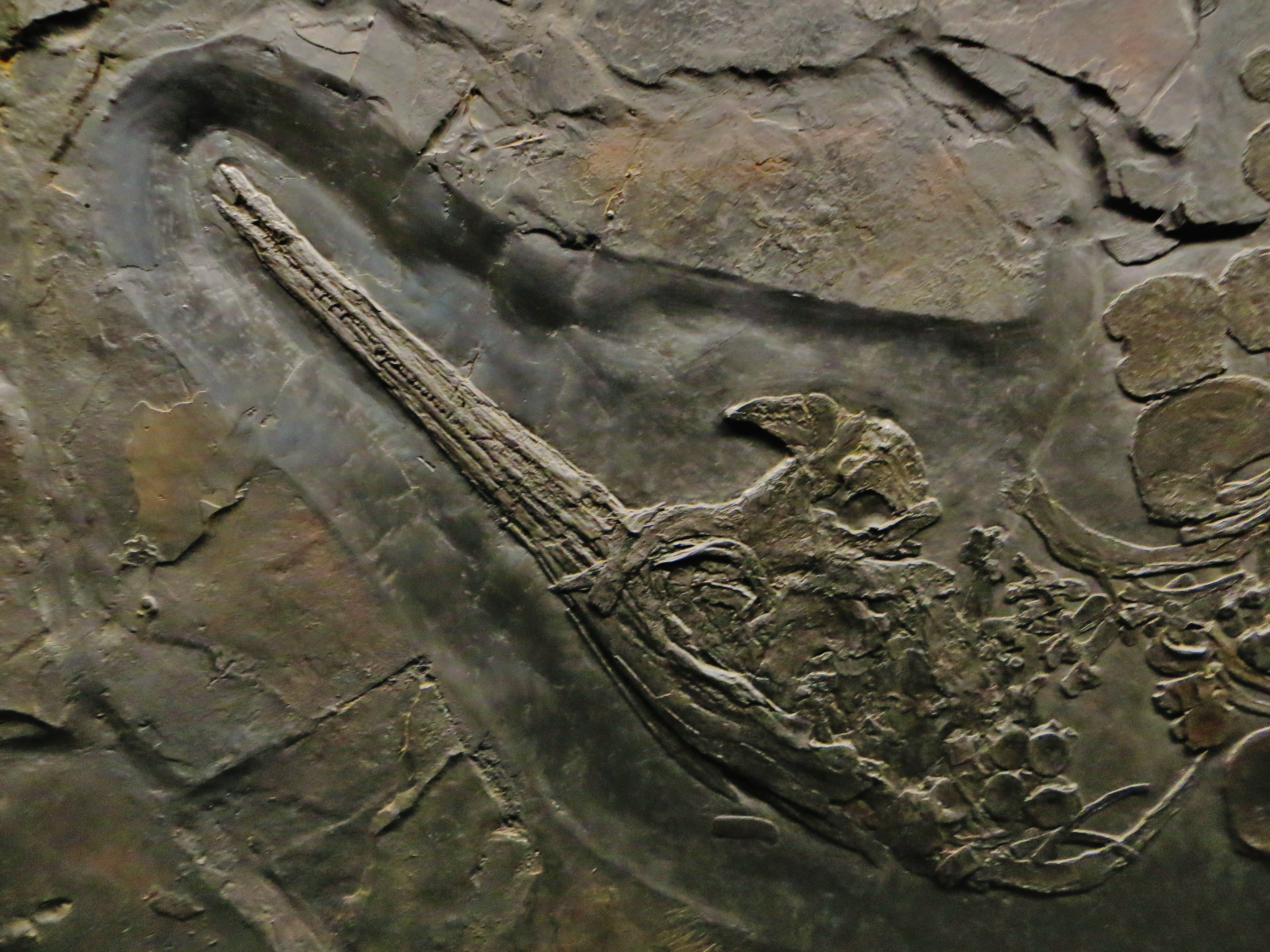 Fossil of Besanosaurus- Museo di Storia Naturale di Milano